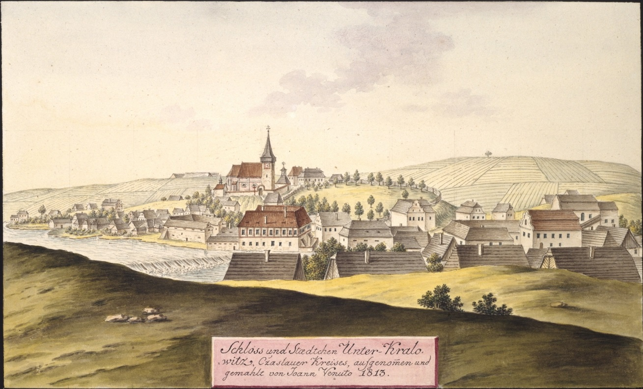 Zámek a městys Dolní Kralovice. Schloss und Staedtchen Unter-Kralowitz, Czaslauer Kreises, aufgenommen und gemahlt von Joann Venuto 1813